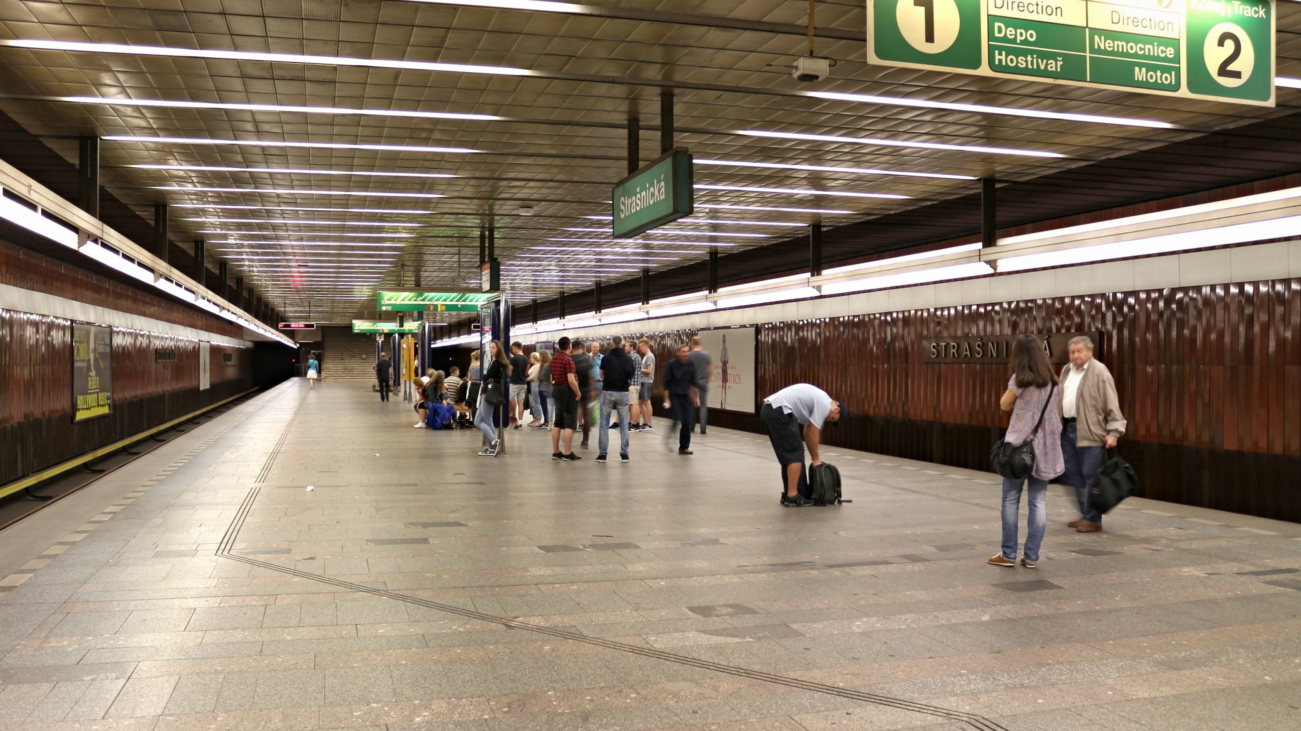 Strašnická metro